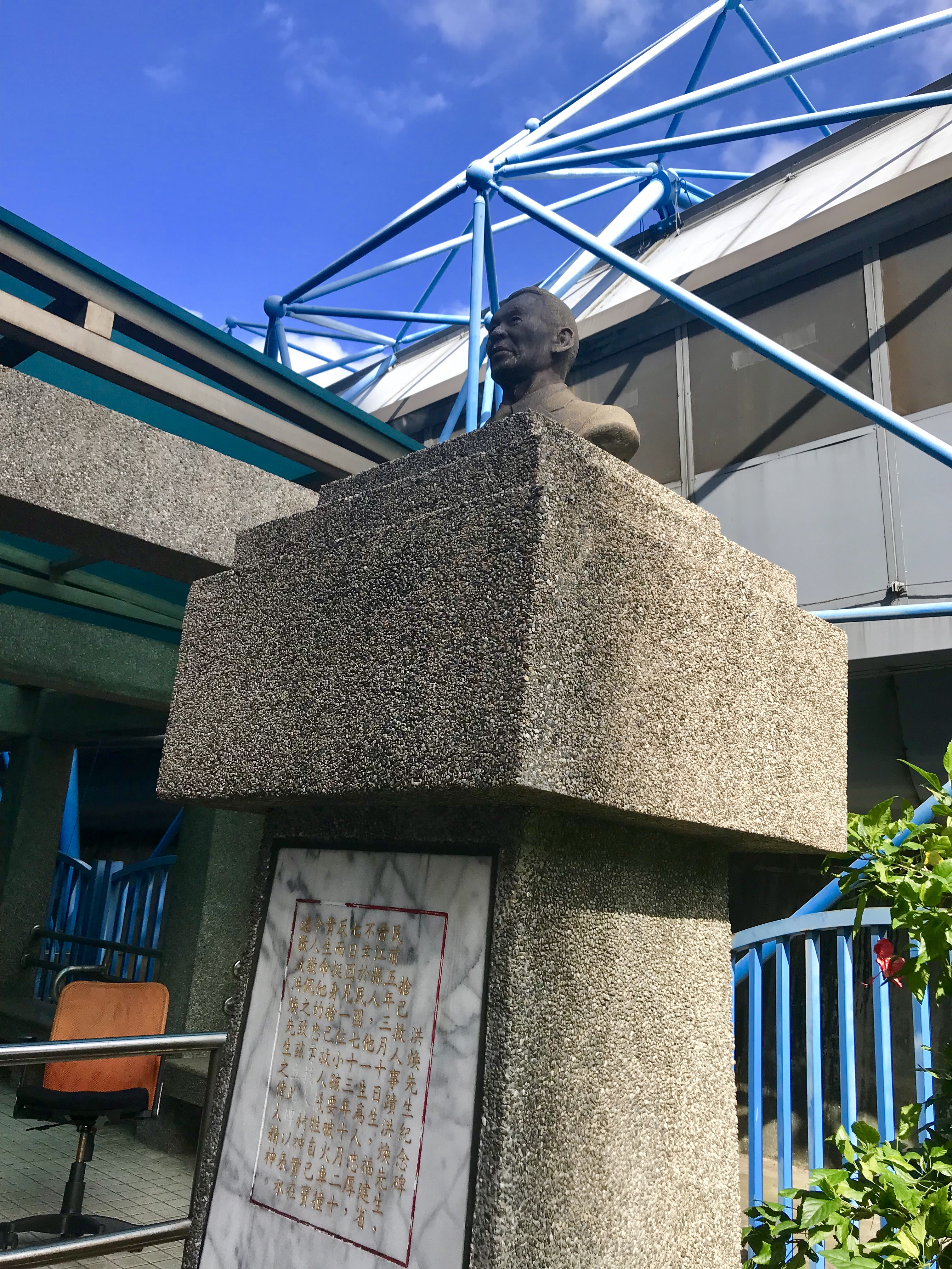 中文（台灣）: 洪煥紀念銅像